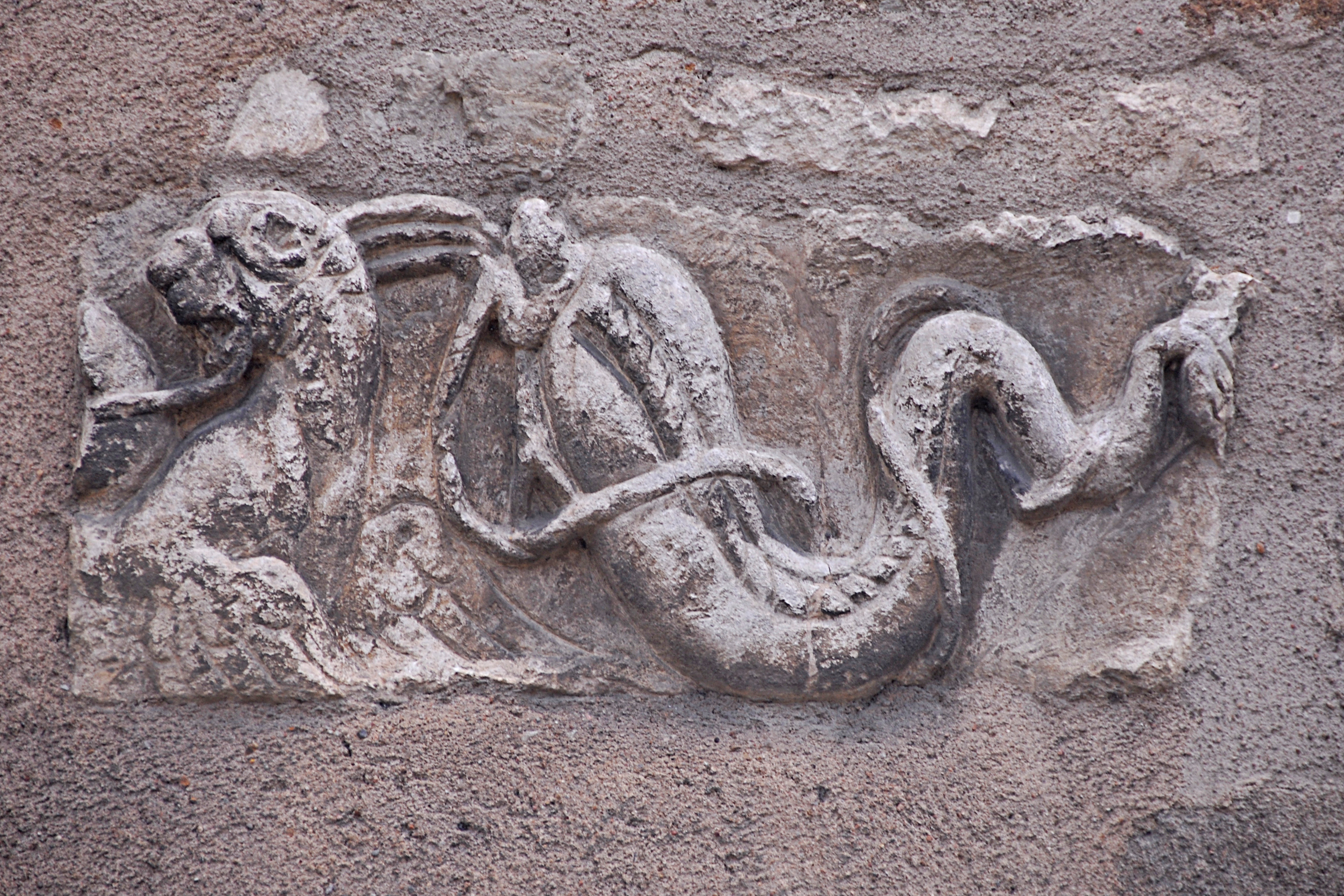 Neuvy_St.-Sépulcre, Rotunde, Relief an Außenwand